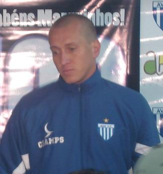 Marquinhos no Avaí